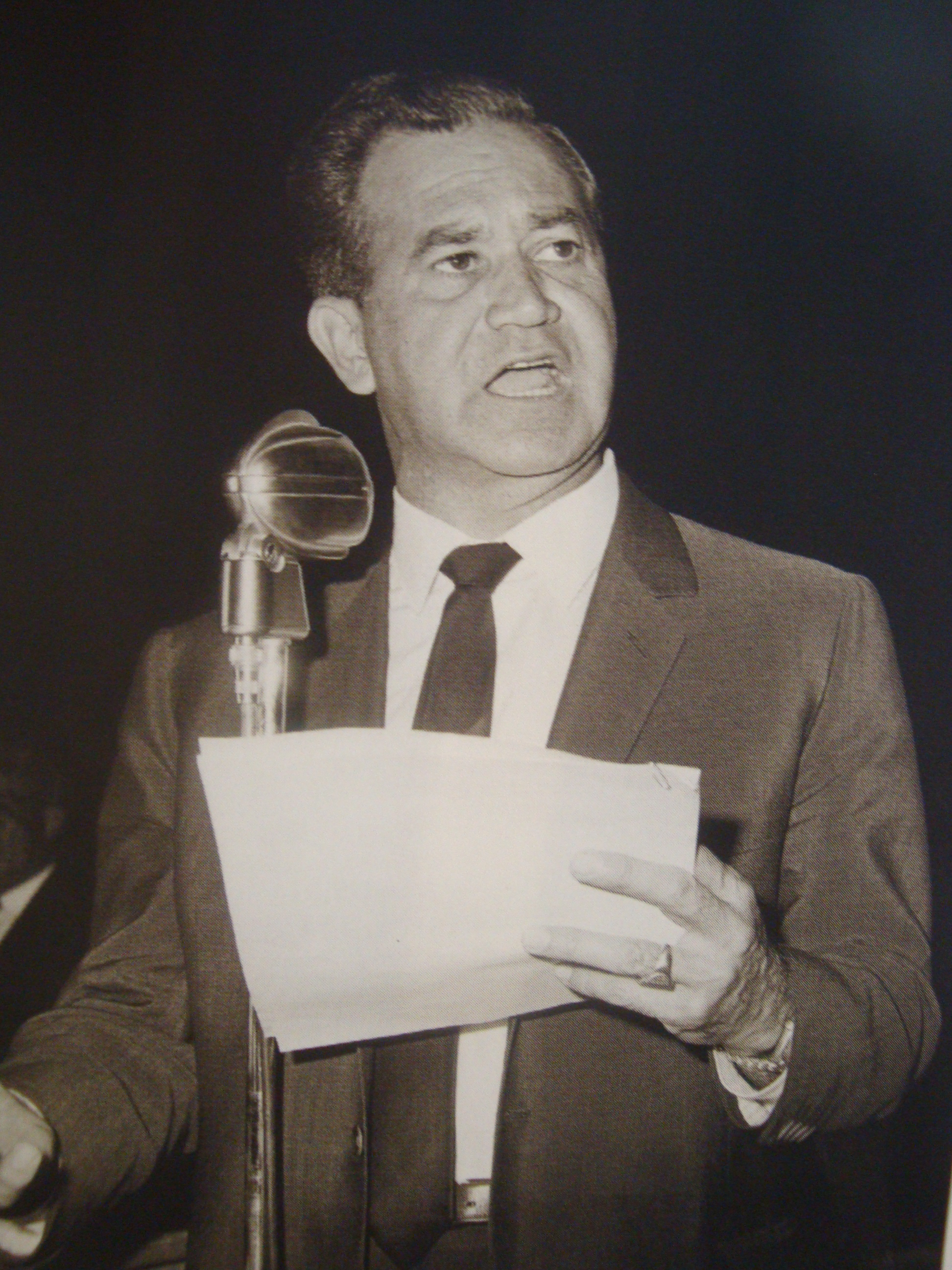 Lic. Carlos Alberto Madrazo Becerra, ex Gobernador del estado de Tabasco, México.